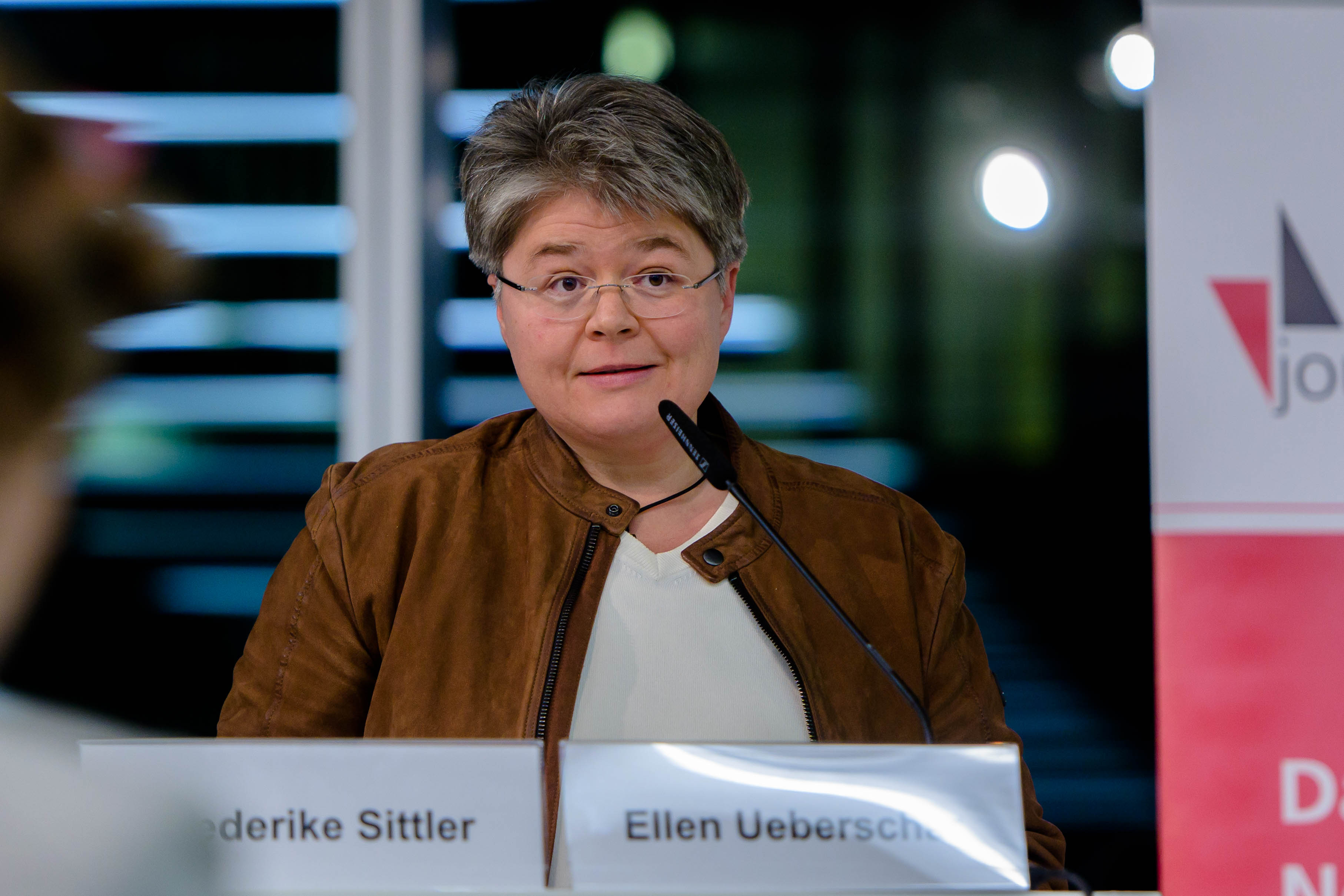 Friederike Sittler auf dem Diskussionsabend "Das geht gar nicht!" im November 2019 bei der Heinrich-Böll-Stiftung